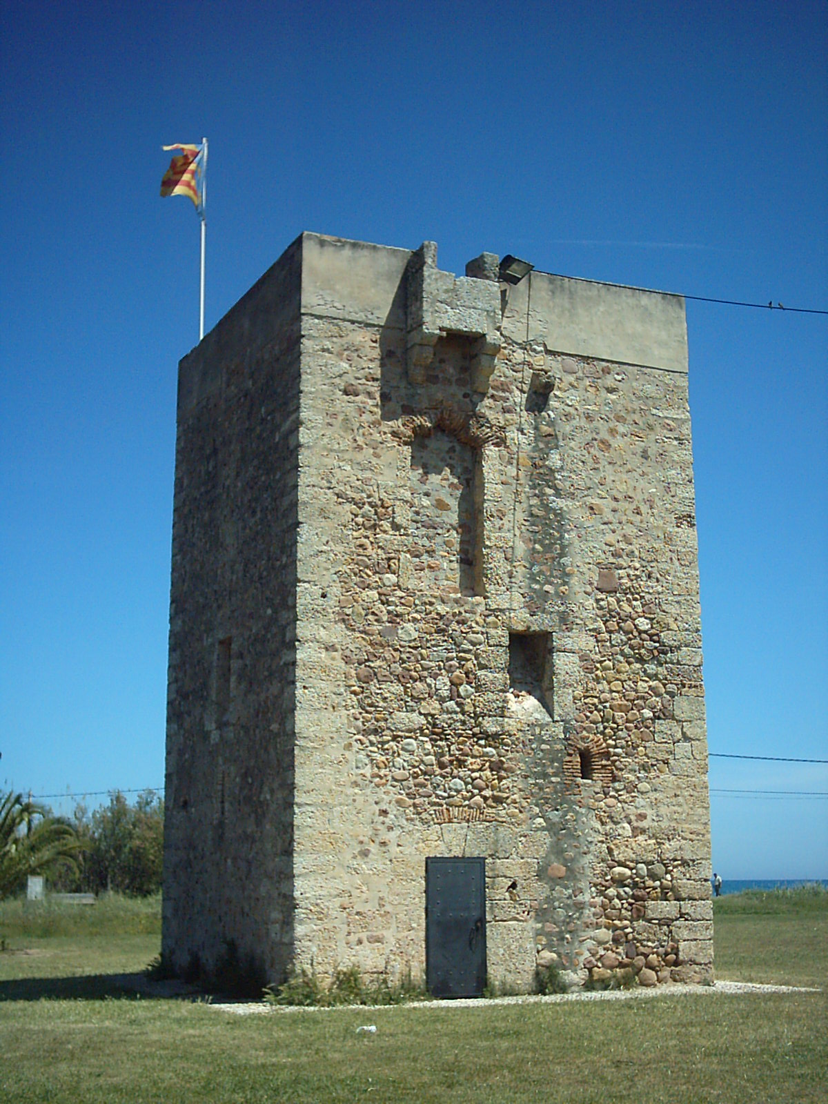 Torre del Mar (Borriana)